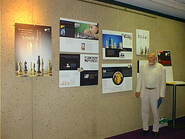 Ausstellung zum Schulschach von Kurt Lellinger, Dortmunder Schachtage 2001.